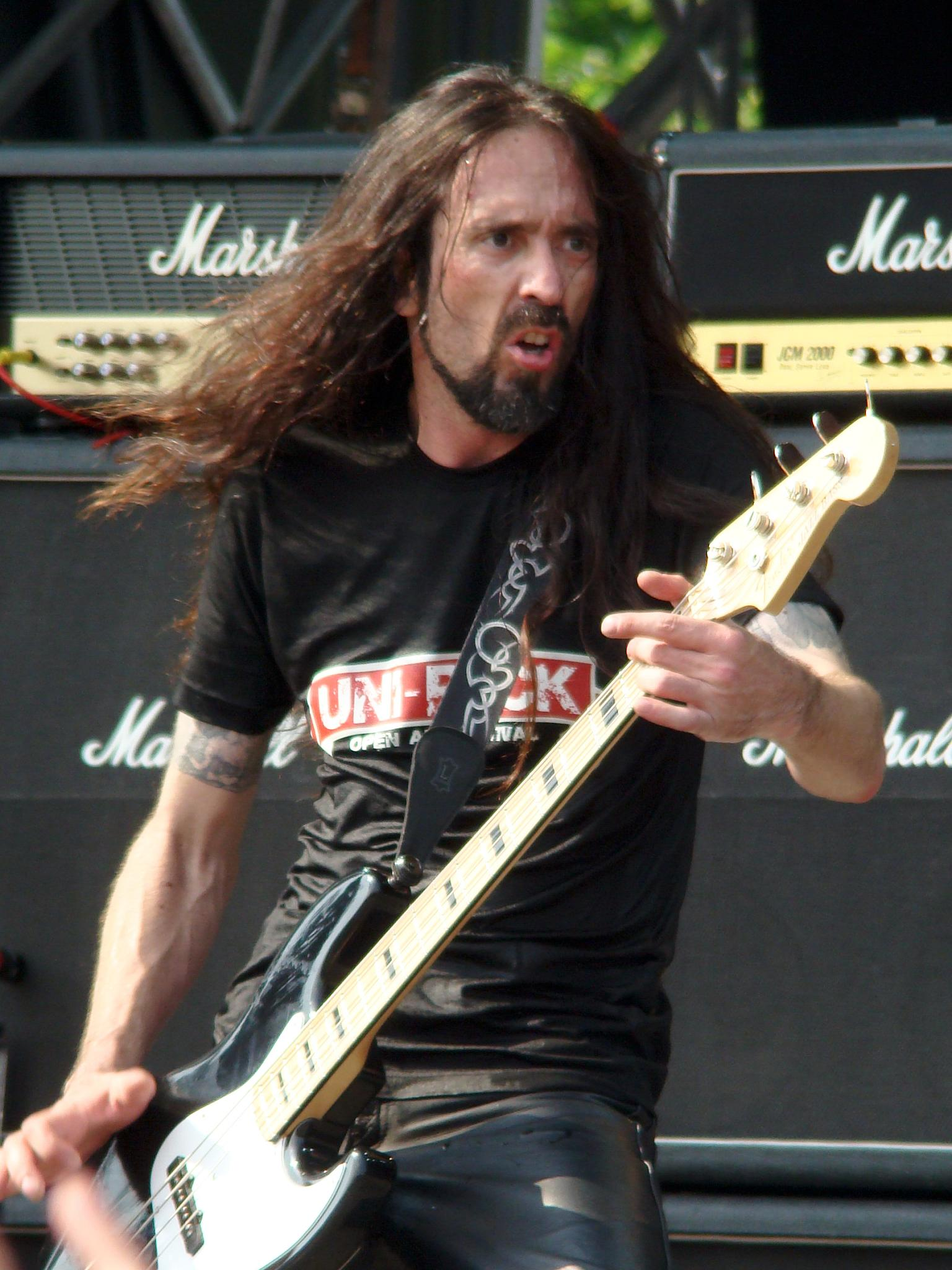 Testament's bassist.